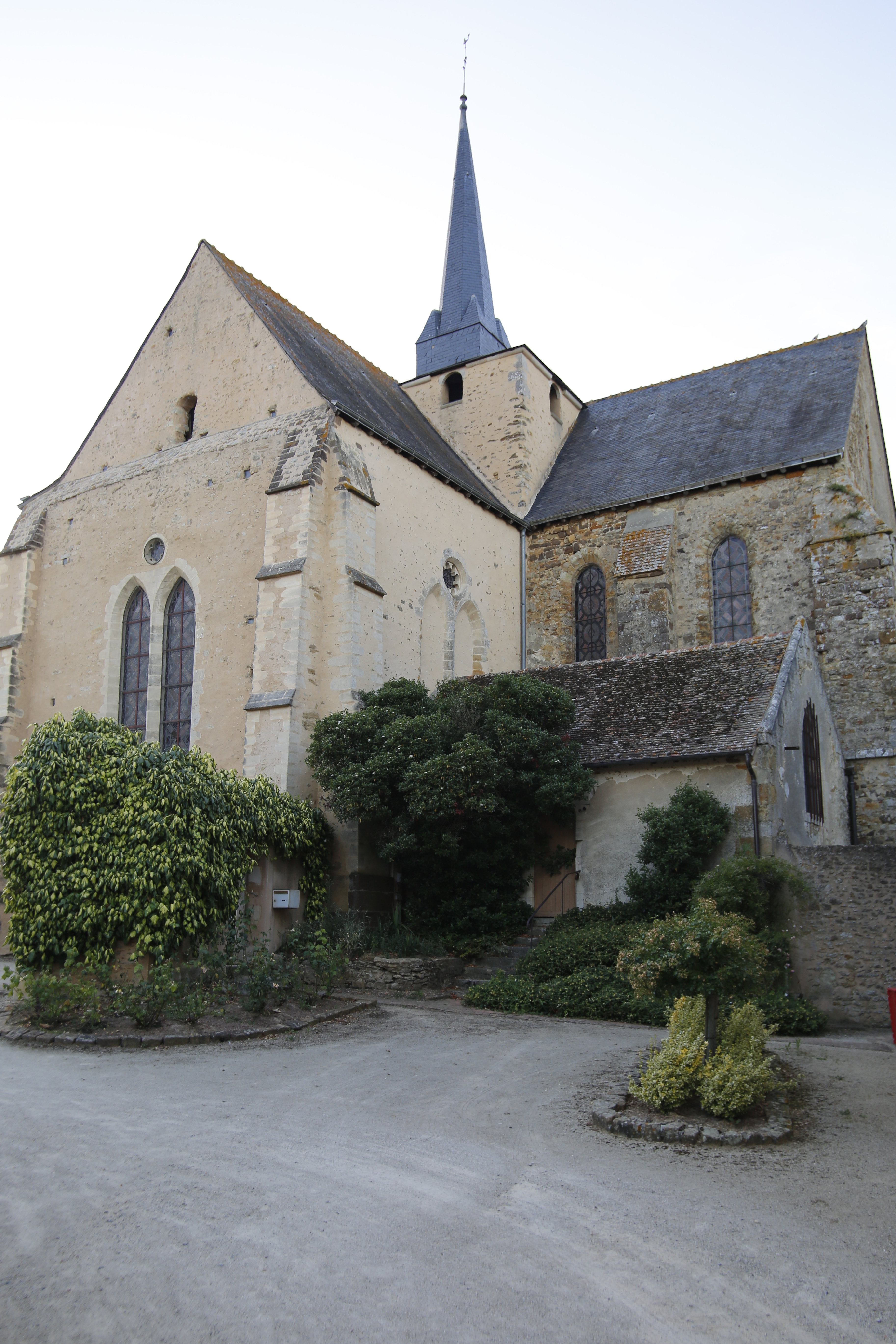 Église Saint-Médard de Saint-Mars-sous-Ballon: transept sud et chœur. .